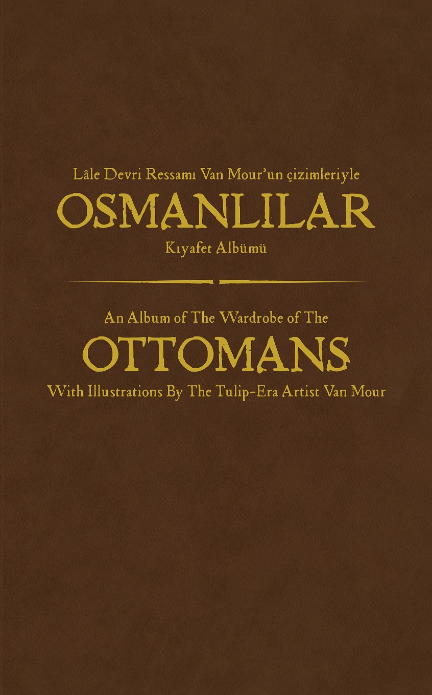 Osmanlı İmparatorluğu zamanında elçi ressamlığı yapan Jean Baptiste Vanmour'un çizimlerinin yer aldığı kitap Sinan Ceco tarafından hazırlamış, İstanbul Büyükşehir Belediyesi tarafından basılmıştır.